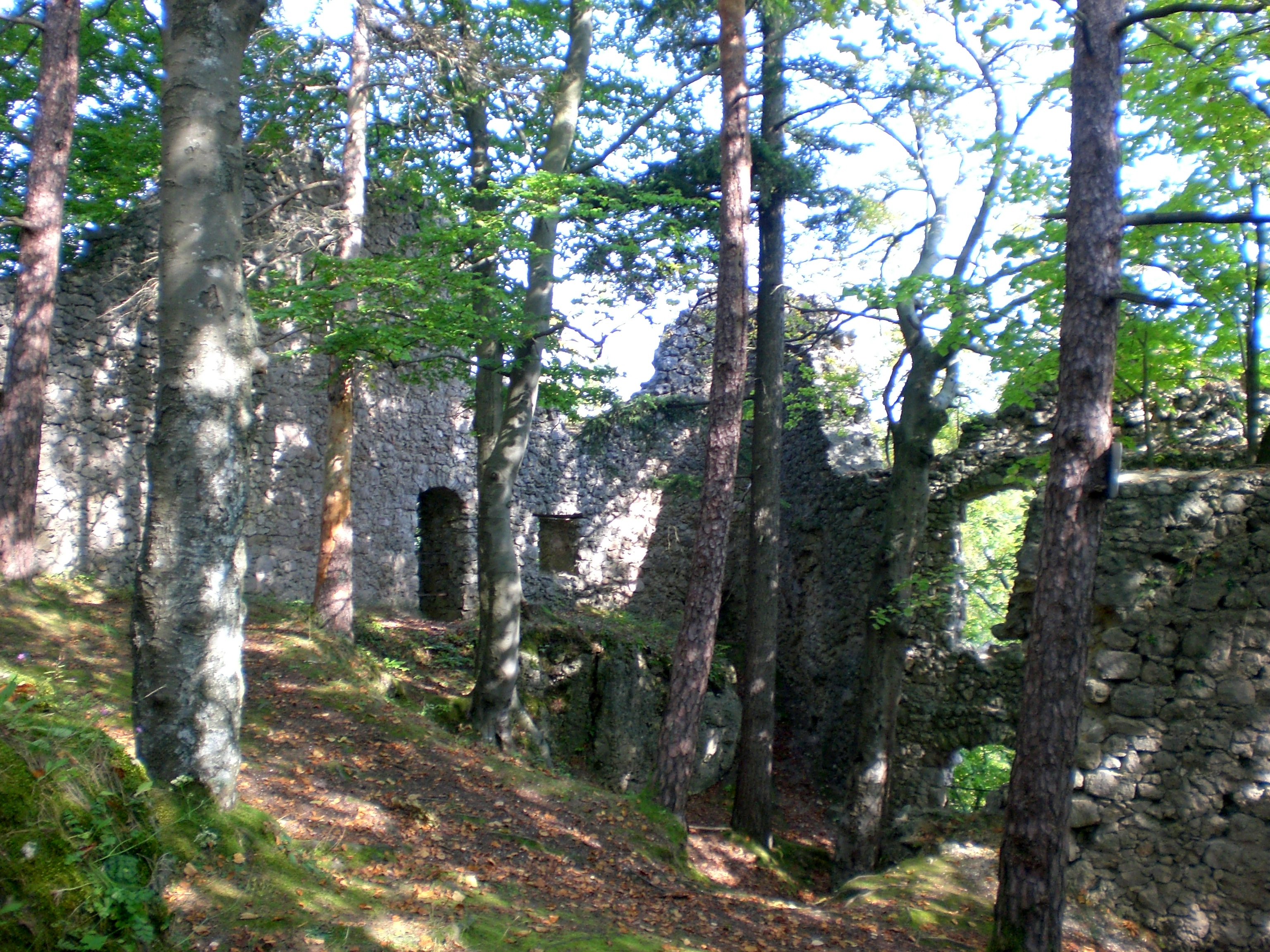 Wildenfels